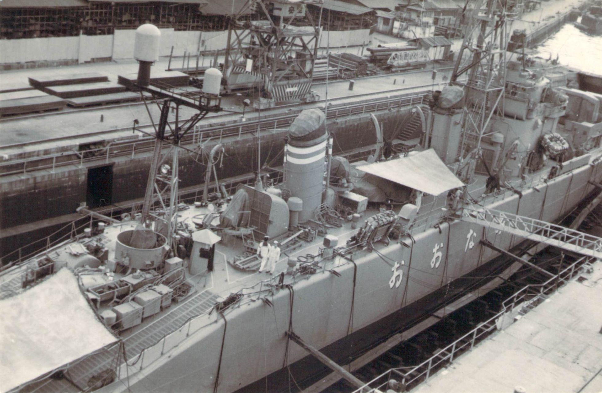 入渠中のおおなみ。 オランダ坂に滑り止めが施されていることが見て取れる。